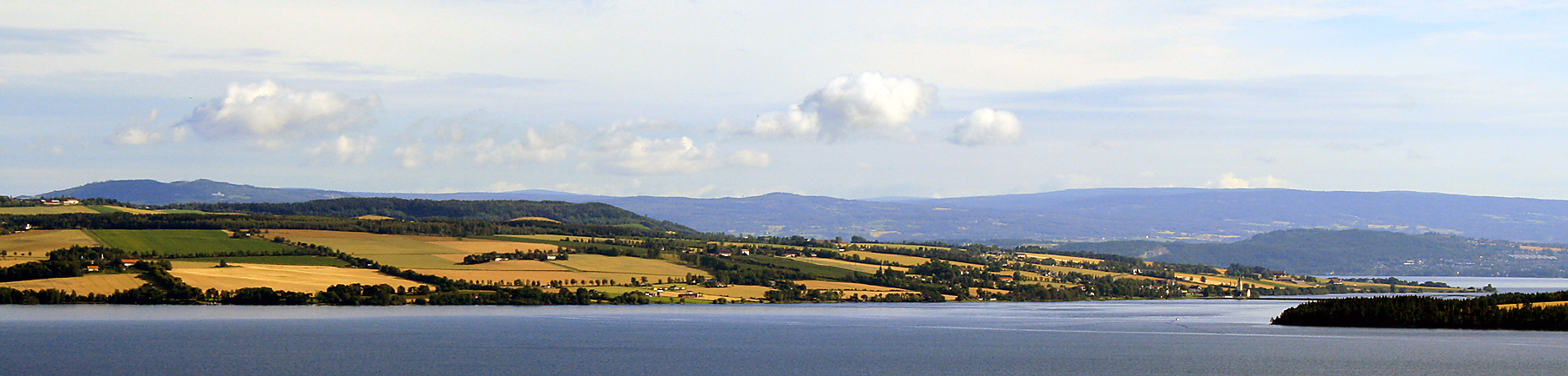 Nes, Ringsaker, Hedmark - sett fra Toten. Nordspissen av Helgøya til høgre.